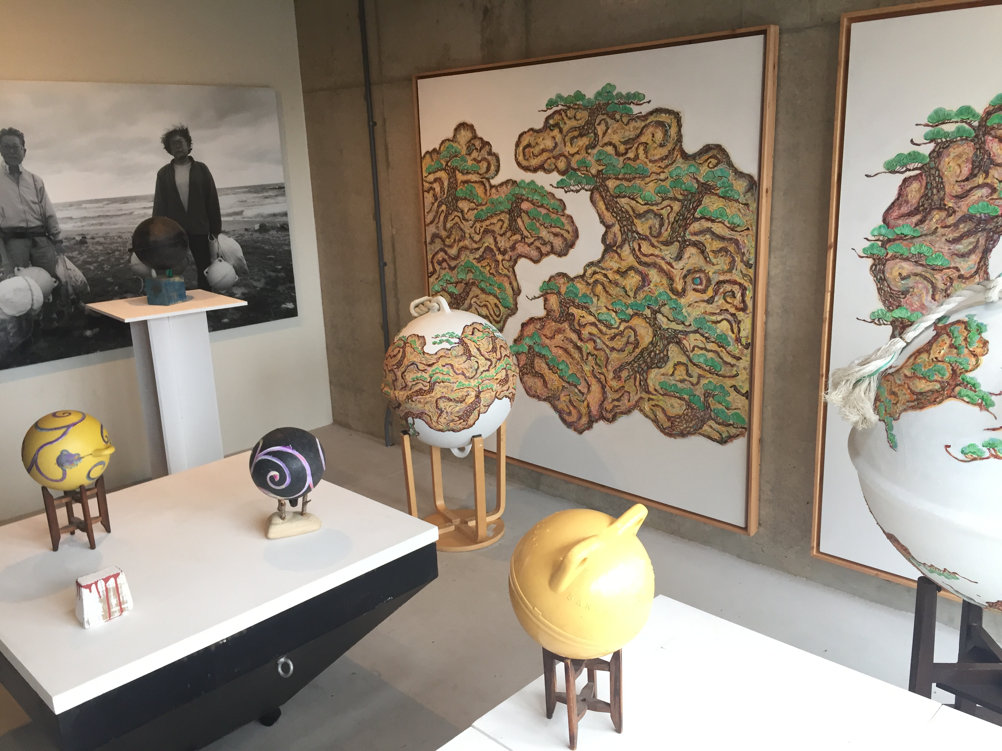 京丹後市網野町浜詰 ヒカリ美術館 2階フロア展示（2019.2.11時点） ※この写真は美術館の許可を得て撮影をしました。